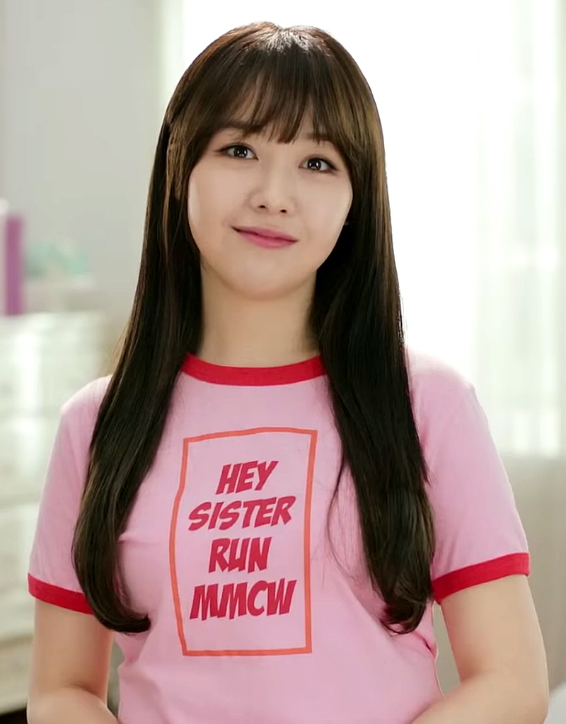 테일즈런너 스페셜 걸스데이 민아